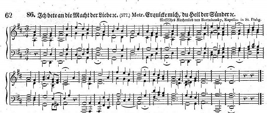 "Ich bete an die Macht der Liebe" in: Johann Heinrich Tscherlitzky: Choralbuch, enthaltend die Melodien zu der Sammlung auserlesener Lieder von der erlösenden Liebe und den Liedern im Schätzkästchen von Johannes Gossner Leipzig: Tauchnitz 1825, S. 62, Nr. 86